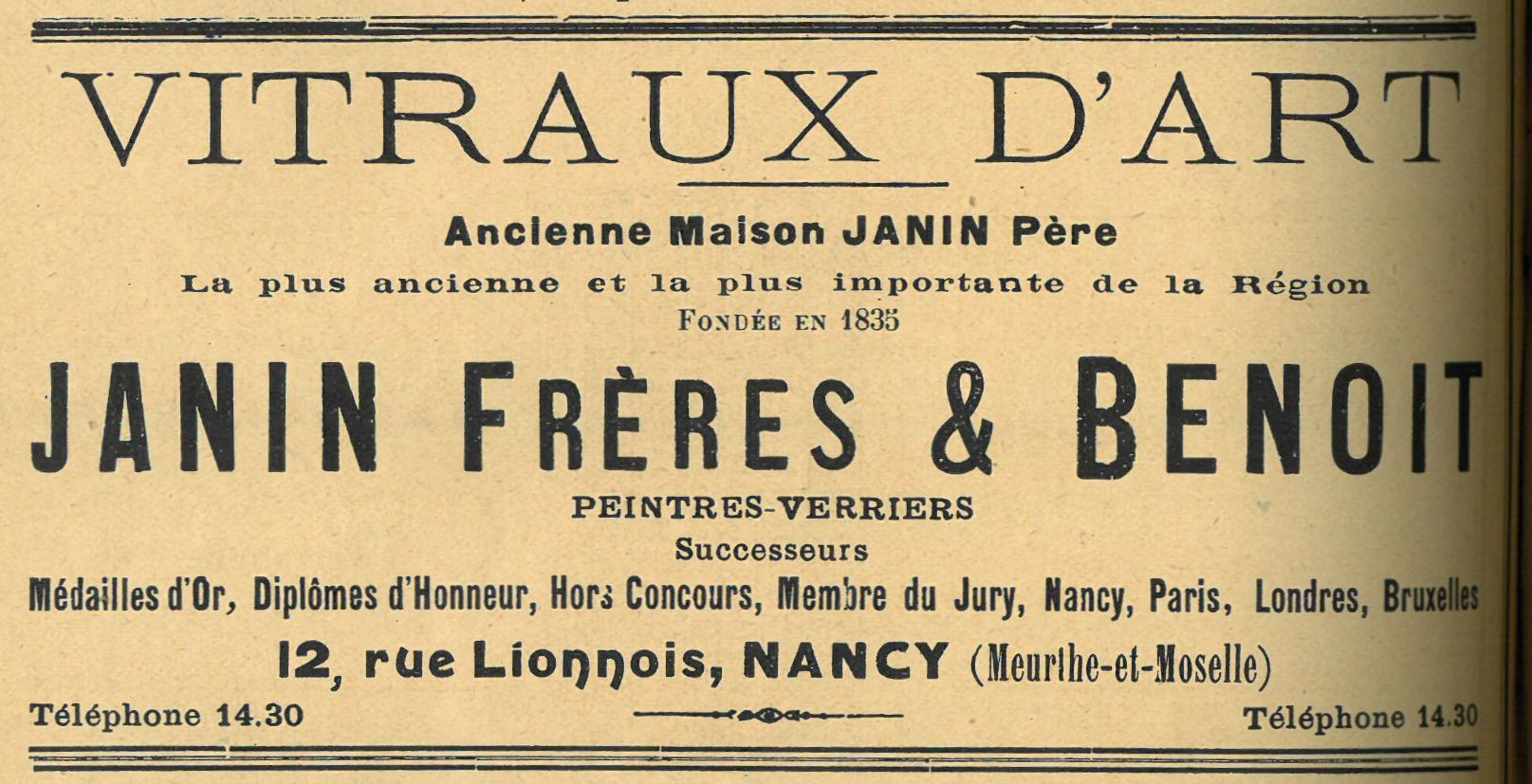 Réclame issue de Annuaire administratif, statistique, historique, judiciaire et commercial de Meurthe-et-Moselle 1912